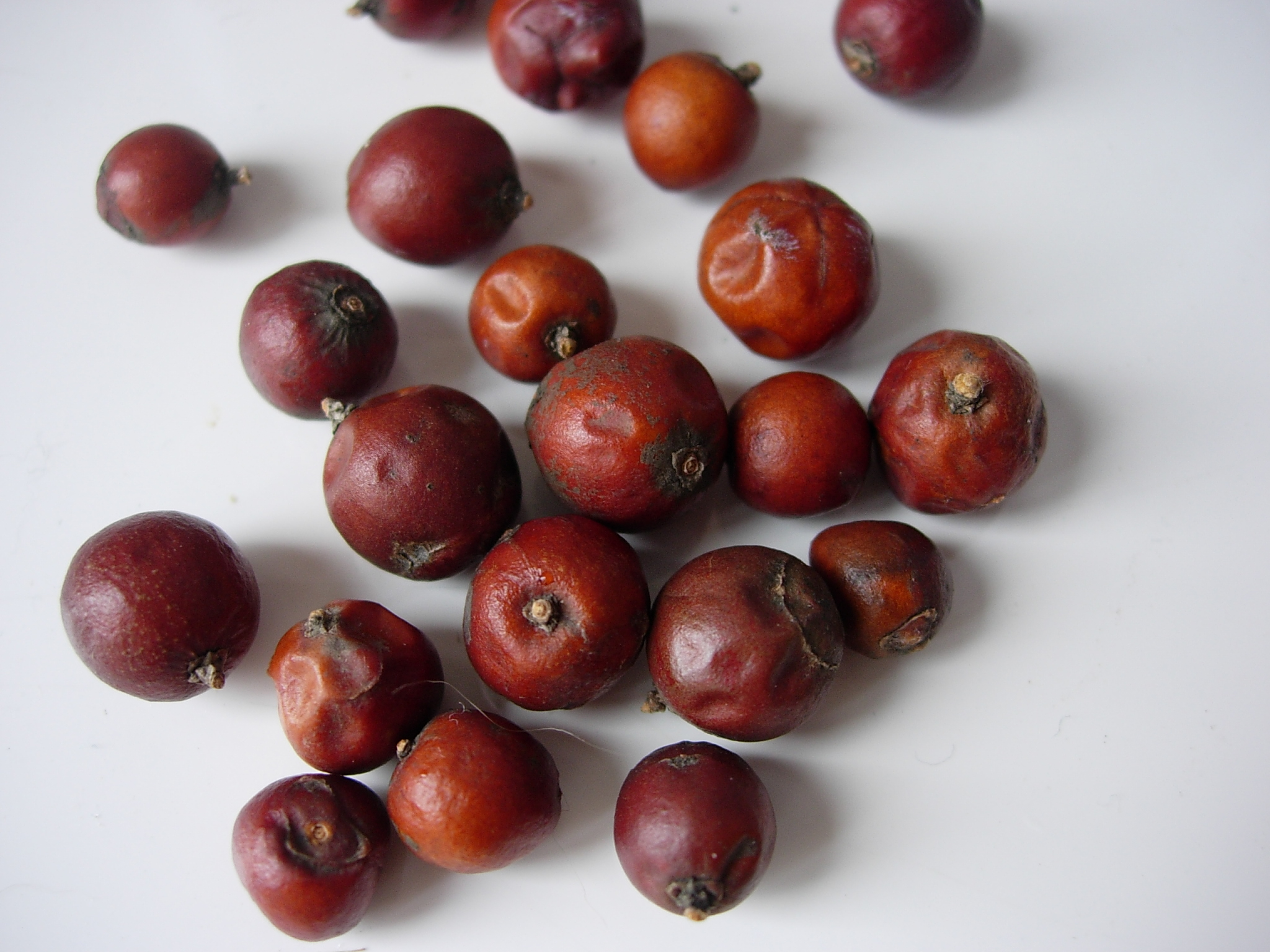 baies de genévrier (Juniperus oxycedrus)